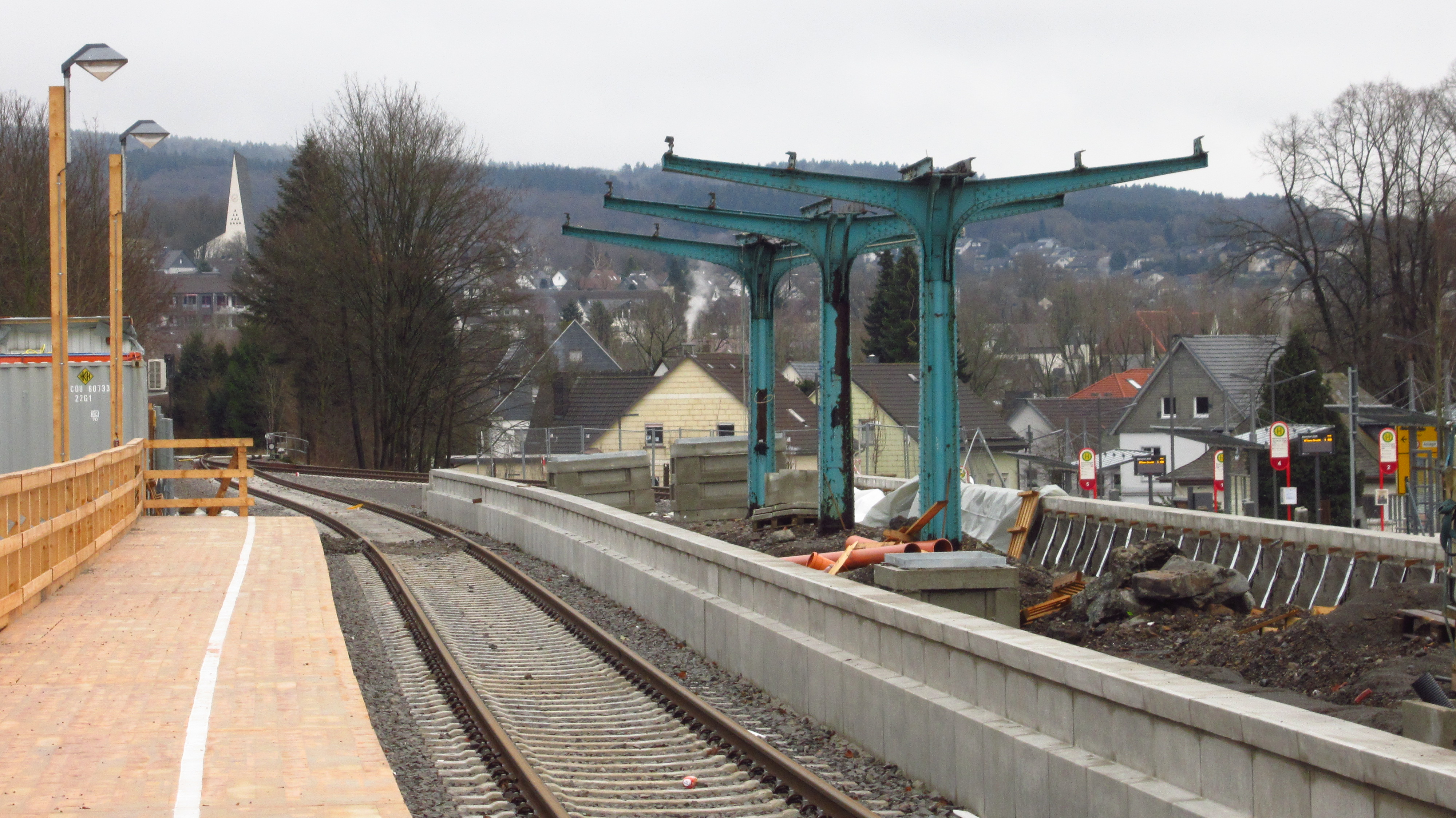 Bahnsteig am Bahnhof Meinerzhagen, Dezember 2013